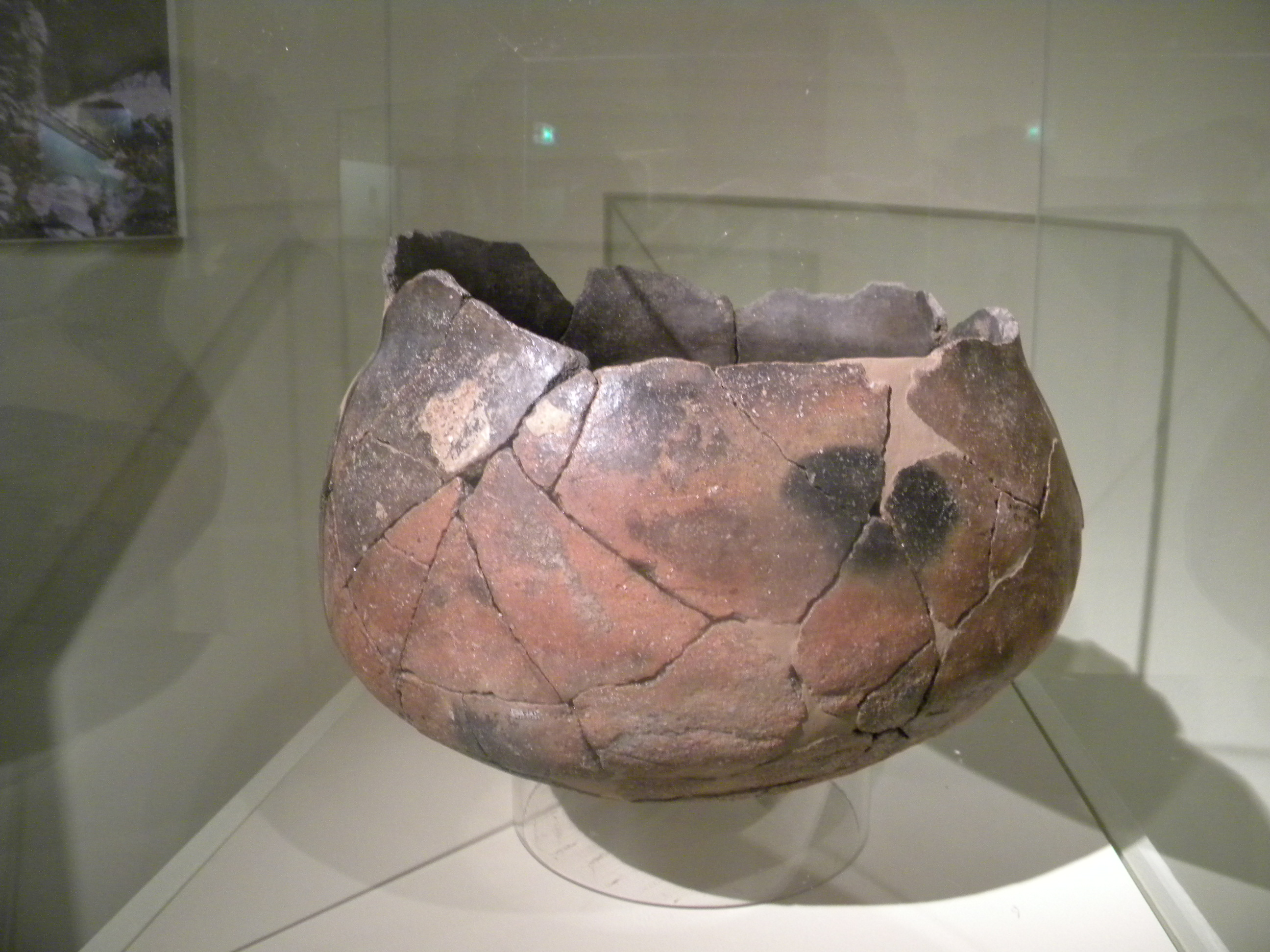 neolitika vazo en Belarta muzeo de Bono